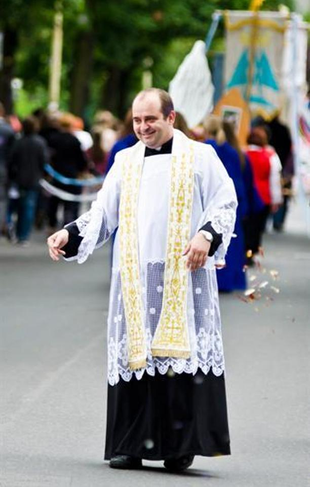 Stargard, ks. wikariusz Łukasz Urbaniak